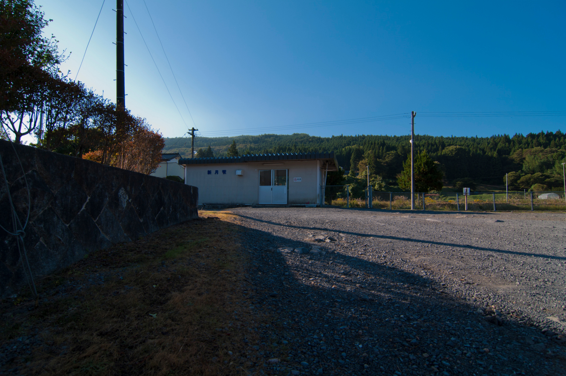 東日本旅客鉄道大船渡線新月駅